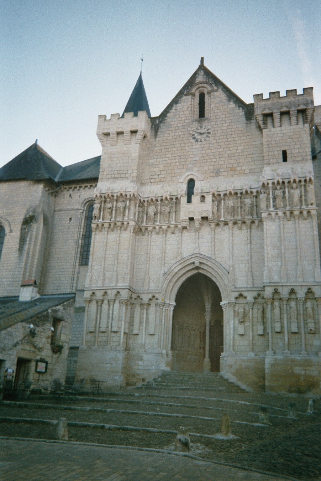 Porche de L'Église Candes Saint Martin (XIIe s.) à 40 km à l'Ouest de Tours - France